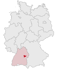 Landkreis Göppingen, Baden-Württemberg, Germany